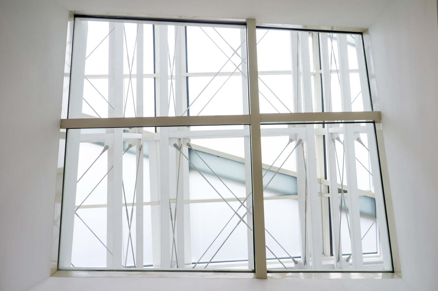 CIDADE - 201405 - 25